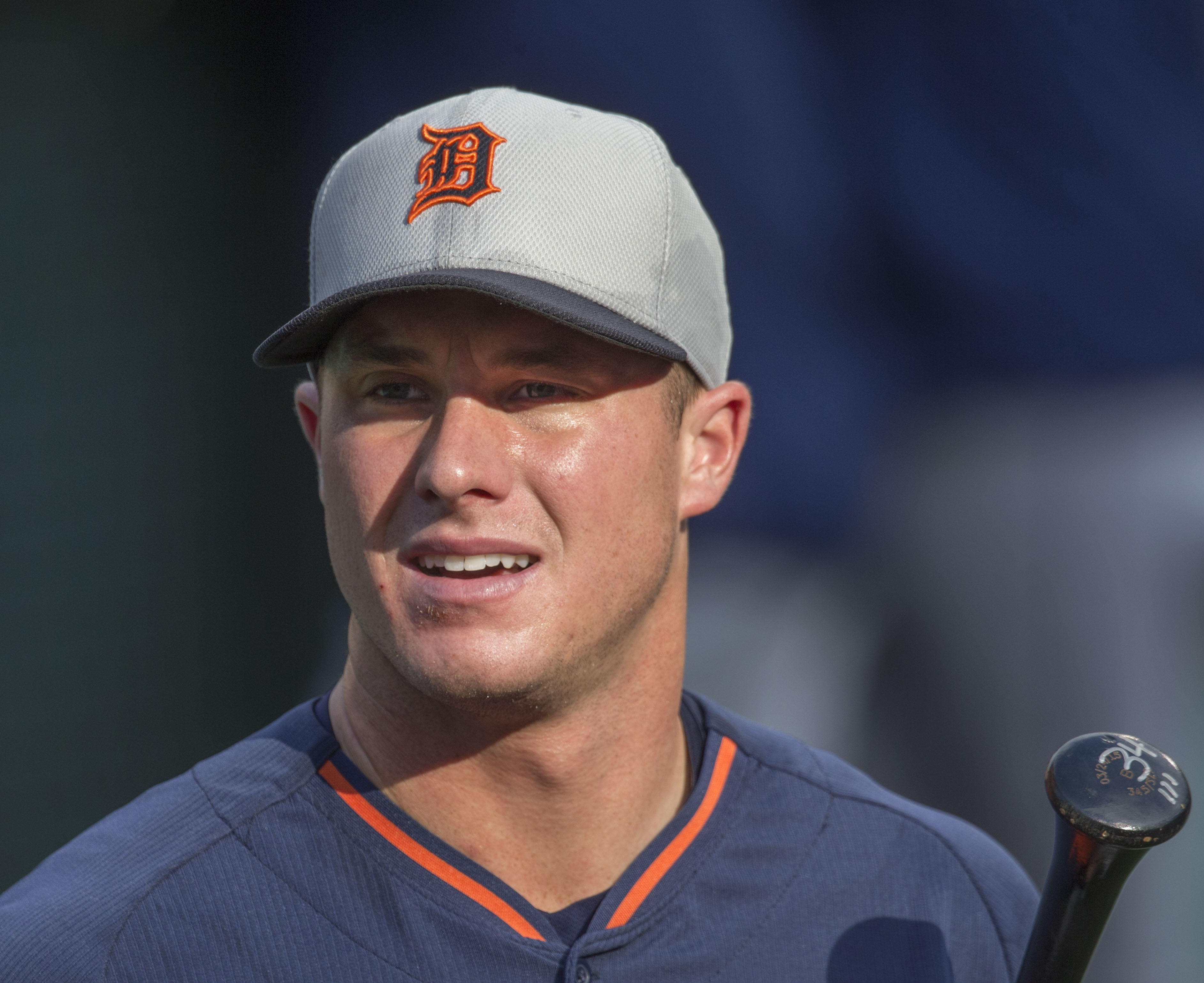 Tigers at Orioles 8/1/15